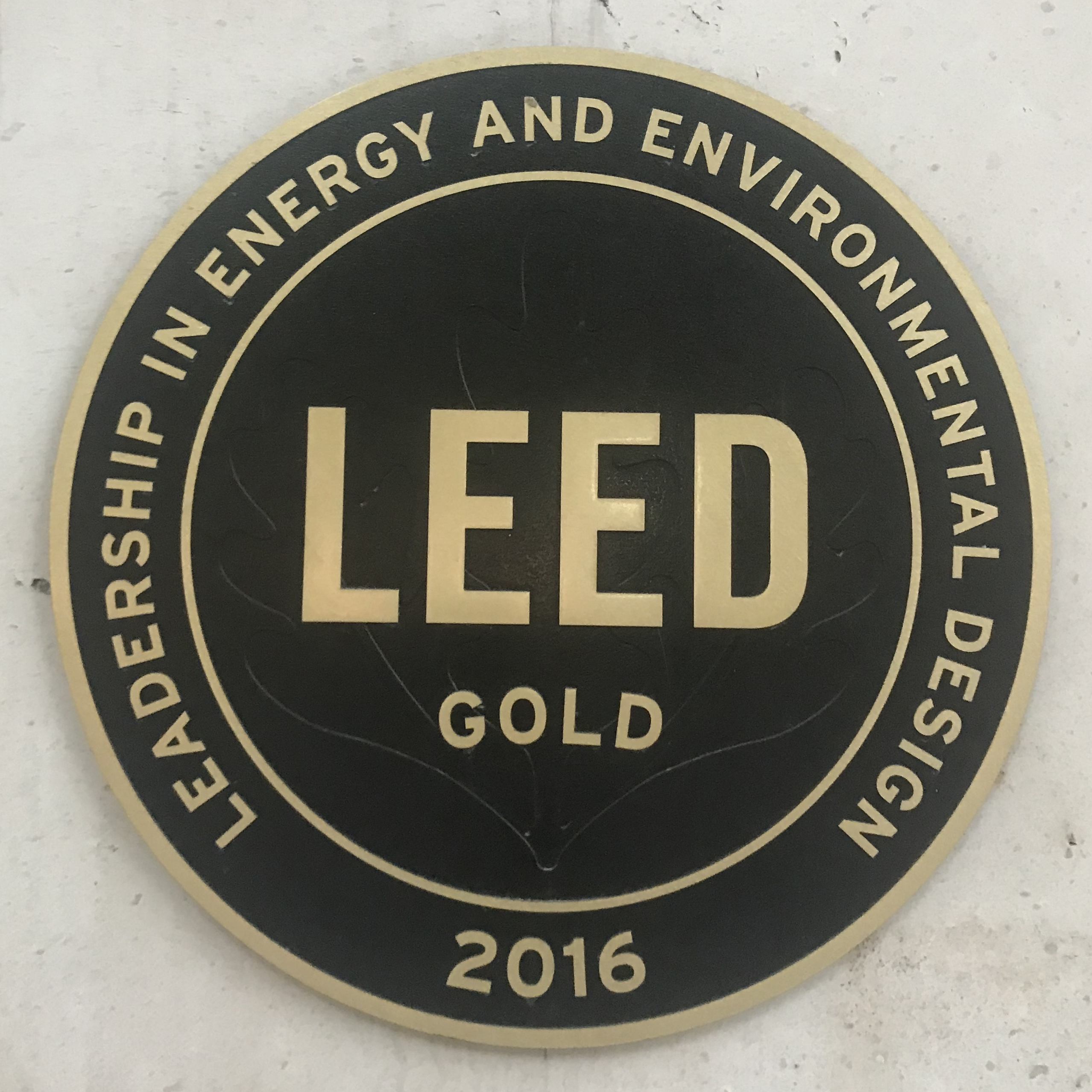 Placa del certificado LEED Gold de un edificio en la calle Serrano 55 en Madrid, España.